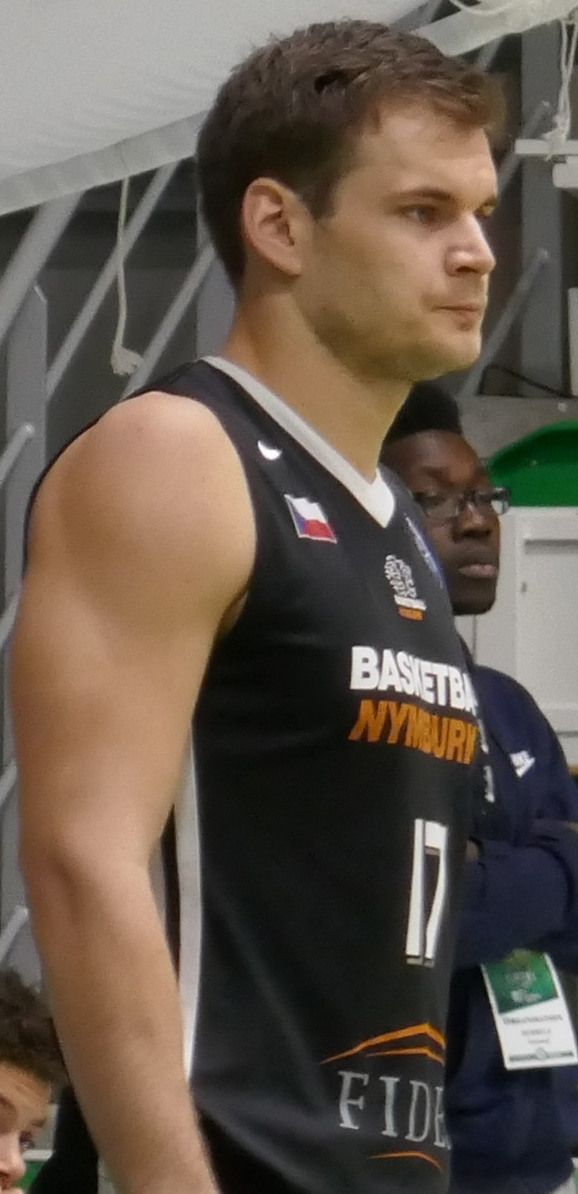 Jaromir Bohacik